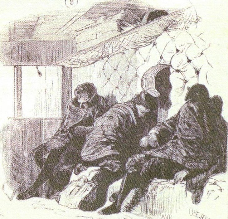 L'Estudiantina Espagnola retour de Paris où elle a triomphé le Mardi Gras 5 mars 1878.